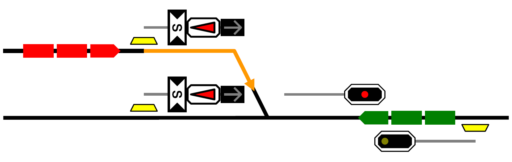 Das BT-Konzept bringt einen unerlaubt abgefahrenen Zug vor dem Ausfahrsignal zum Stehen Orange: Bremsweg des von Integra-Signum oder ZUB 121 gebremsten Zugs